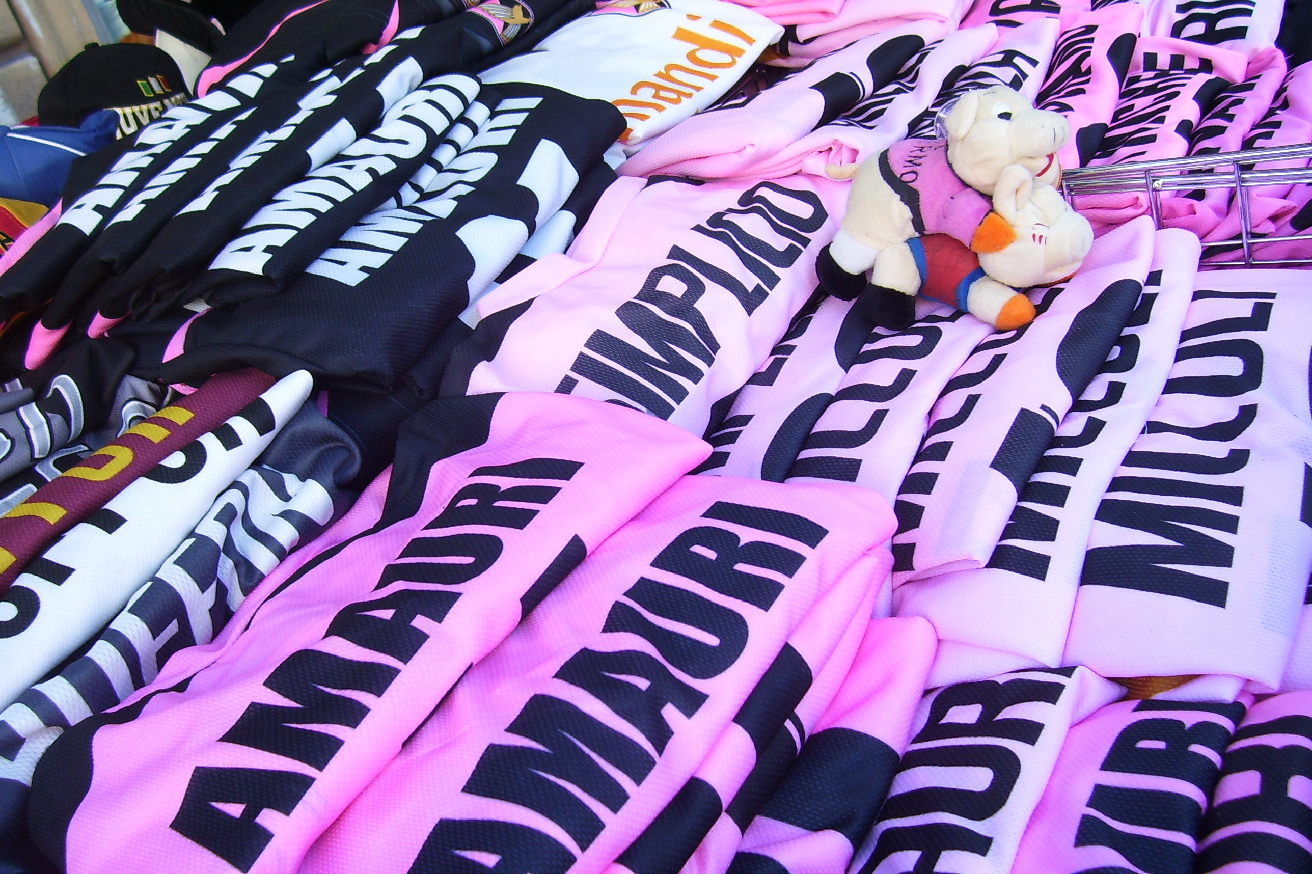 Palermo, maglie e gadget per la squadra del Palermo calcio